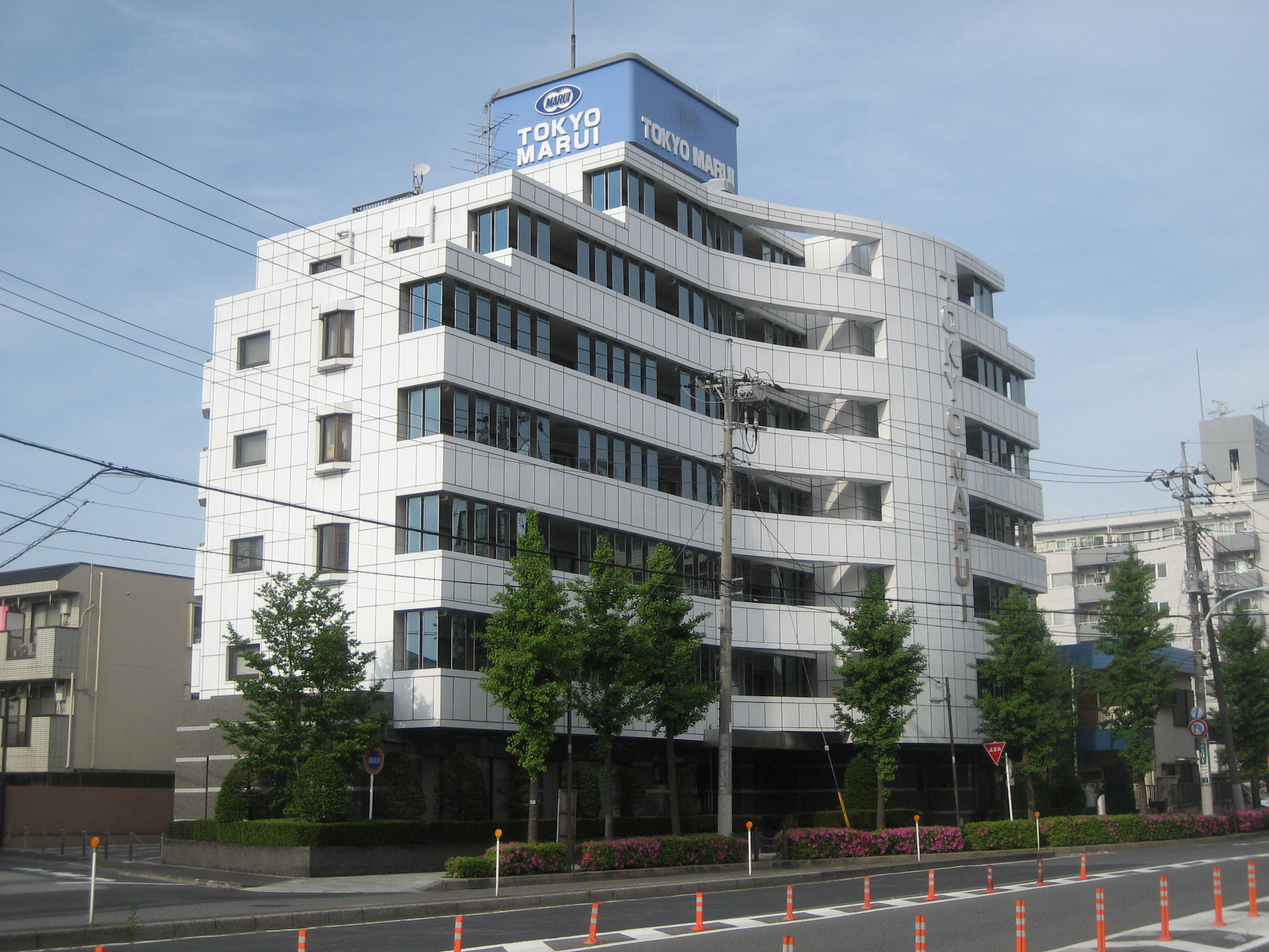 東京都足立区にある東京マルイ本社